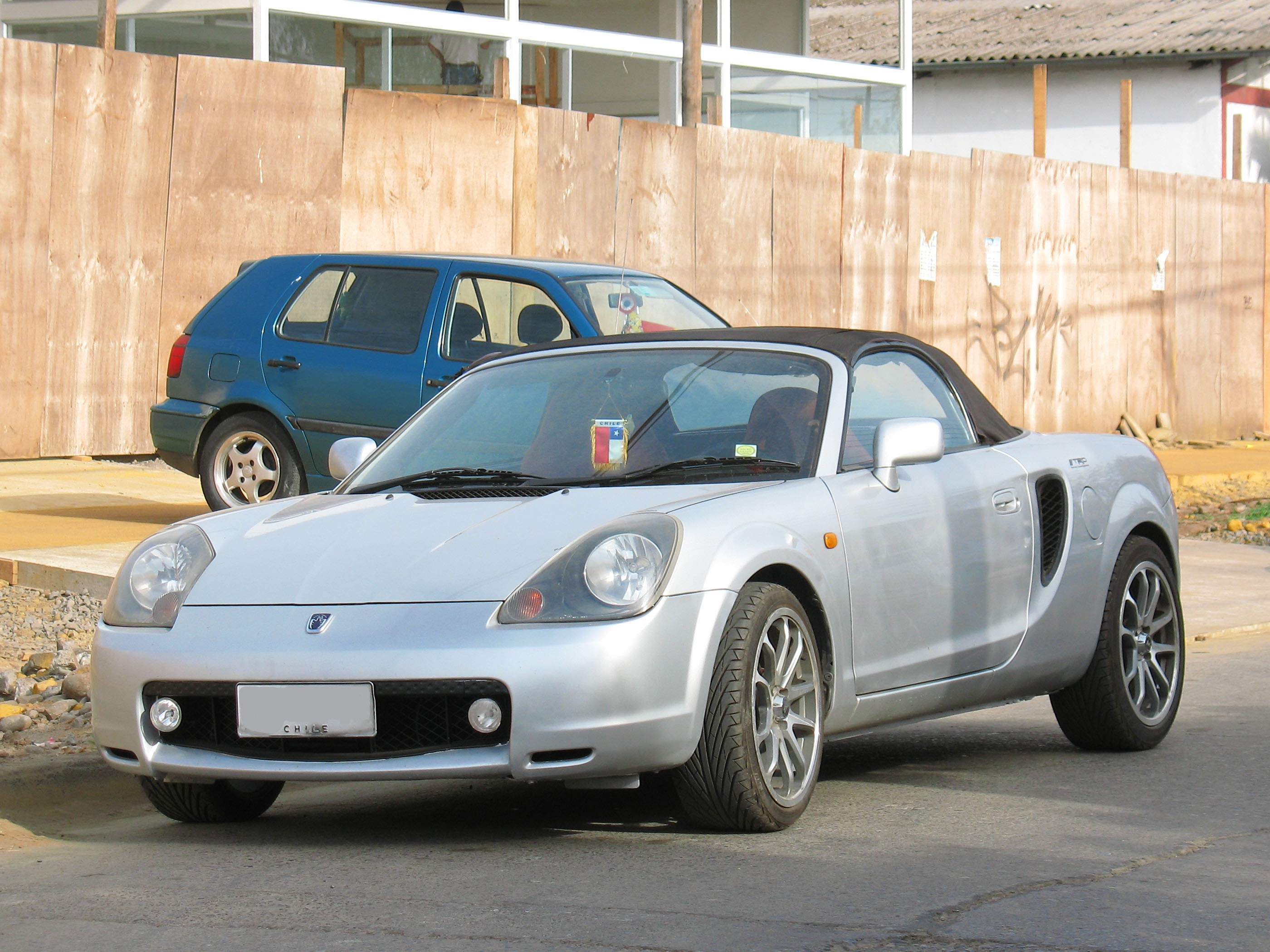 Toyota MR-S 1999